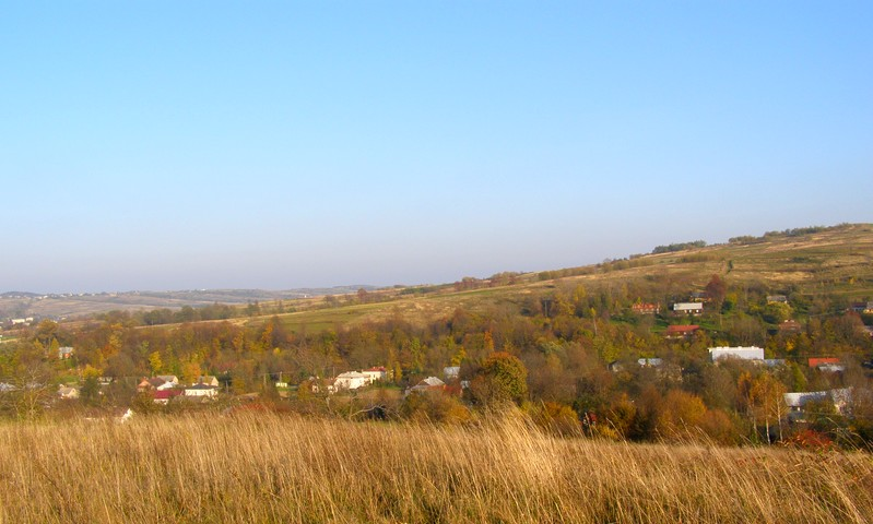 Panorama wsi Draganowa - widok z tzw. Sopkowni